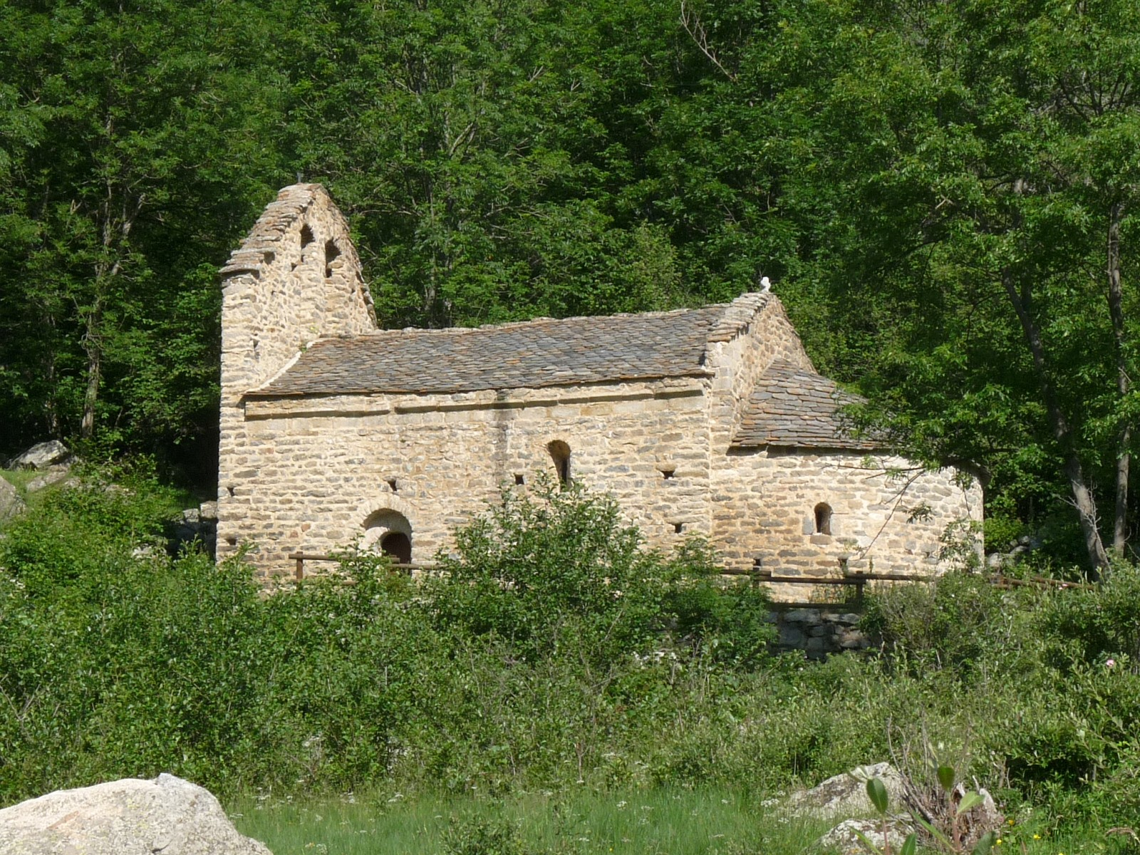 Chapelle St-Martin d'Envalls, Pyrénées-Orientales, France